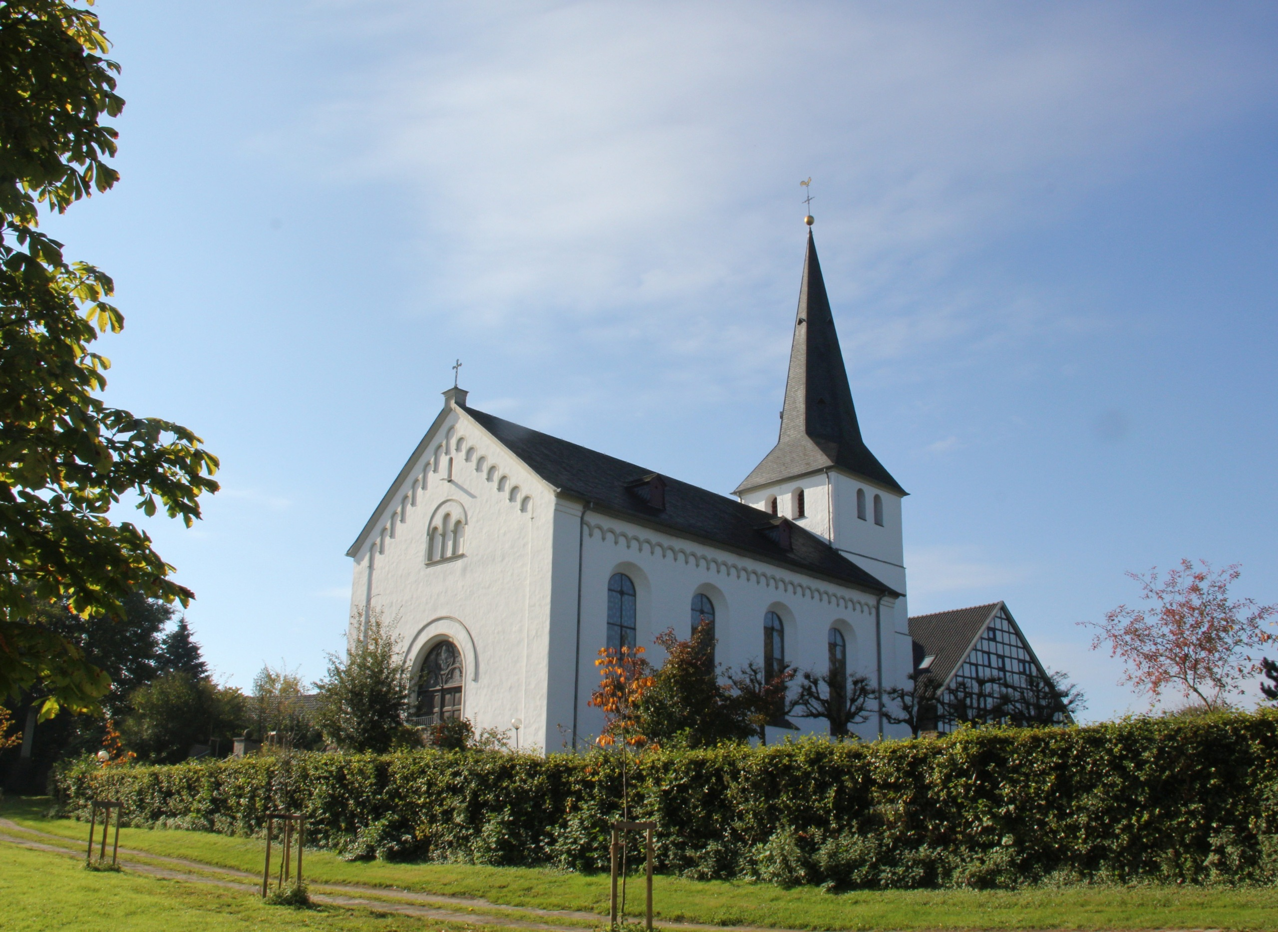 Evangelische Pfarrkirche Honrath